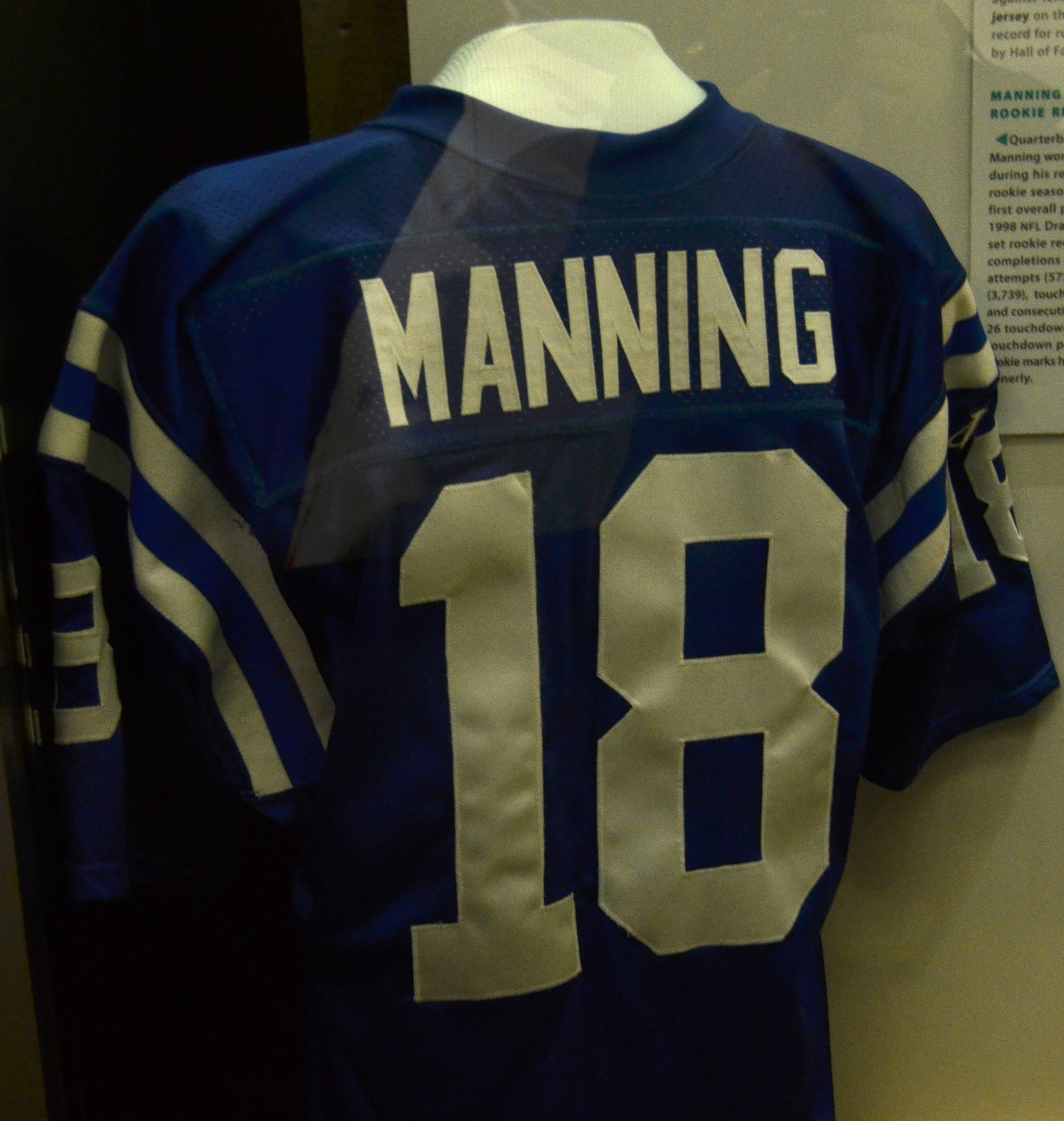 Peyton Manning